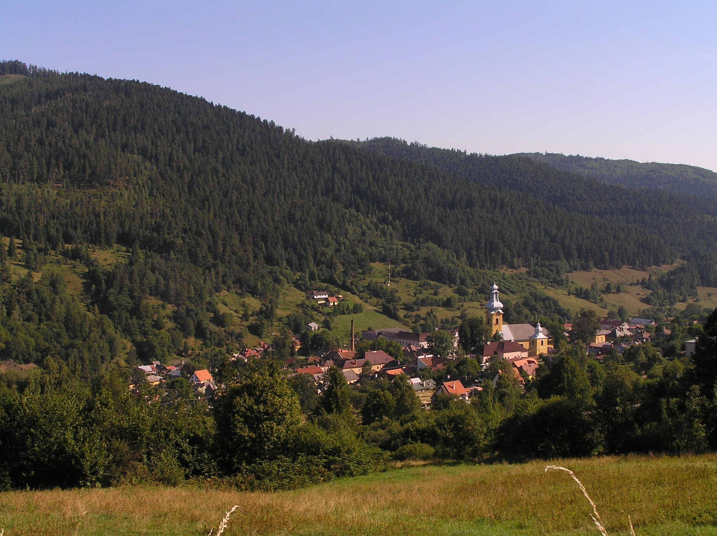 Smolník